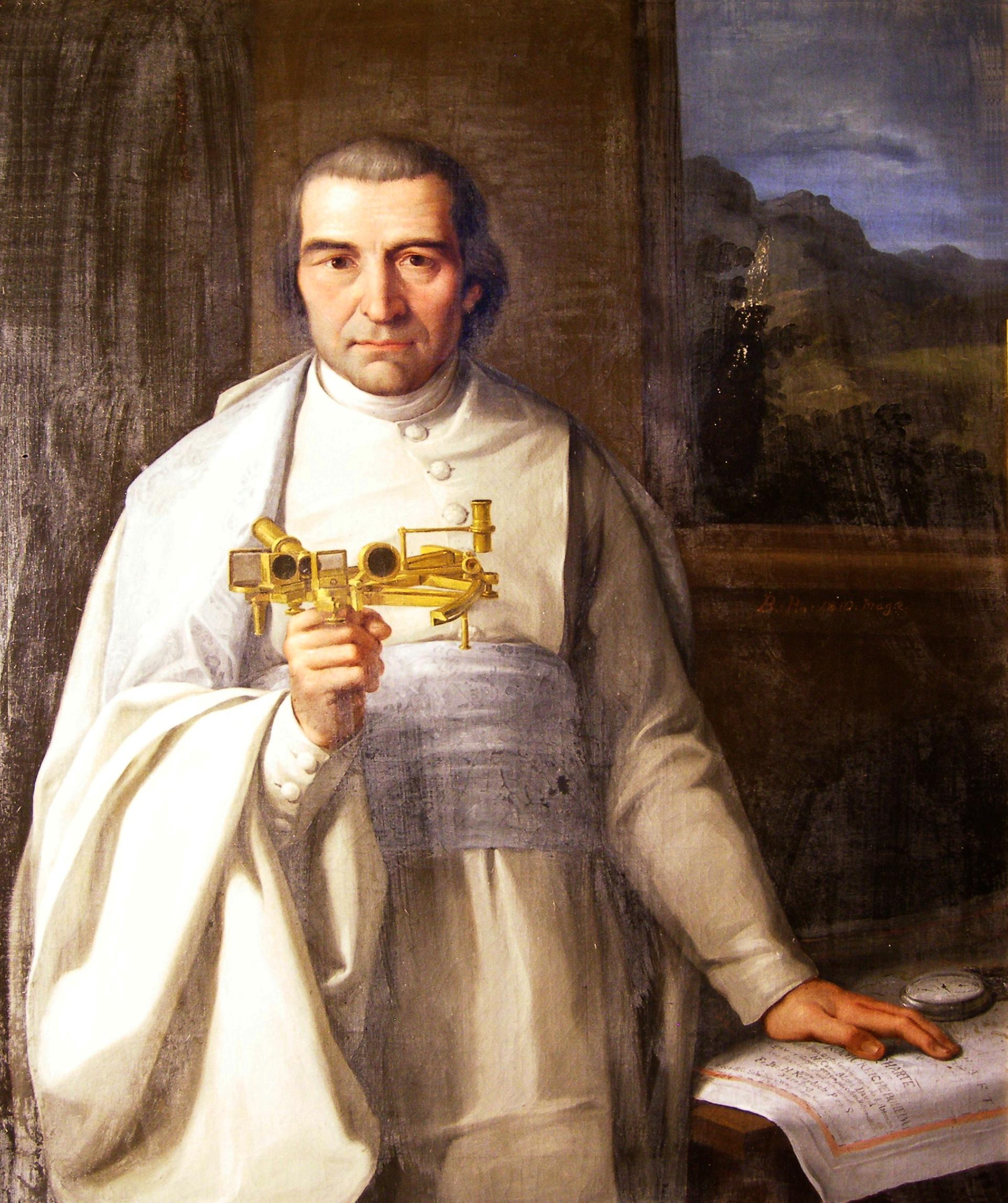 Alois Martin David, portrét se sextantem systému Hadley od londýnské firmy Dollond, autor Josef Bergler, Praha 1810, olej na plátně (reprofoto Jiří Schierl, originál obrazu ve sbírce Kanonie premonstrátů Teplá).